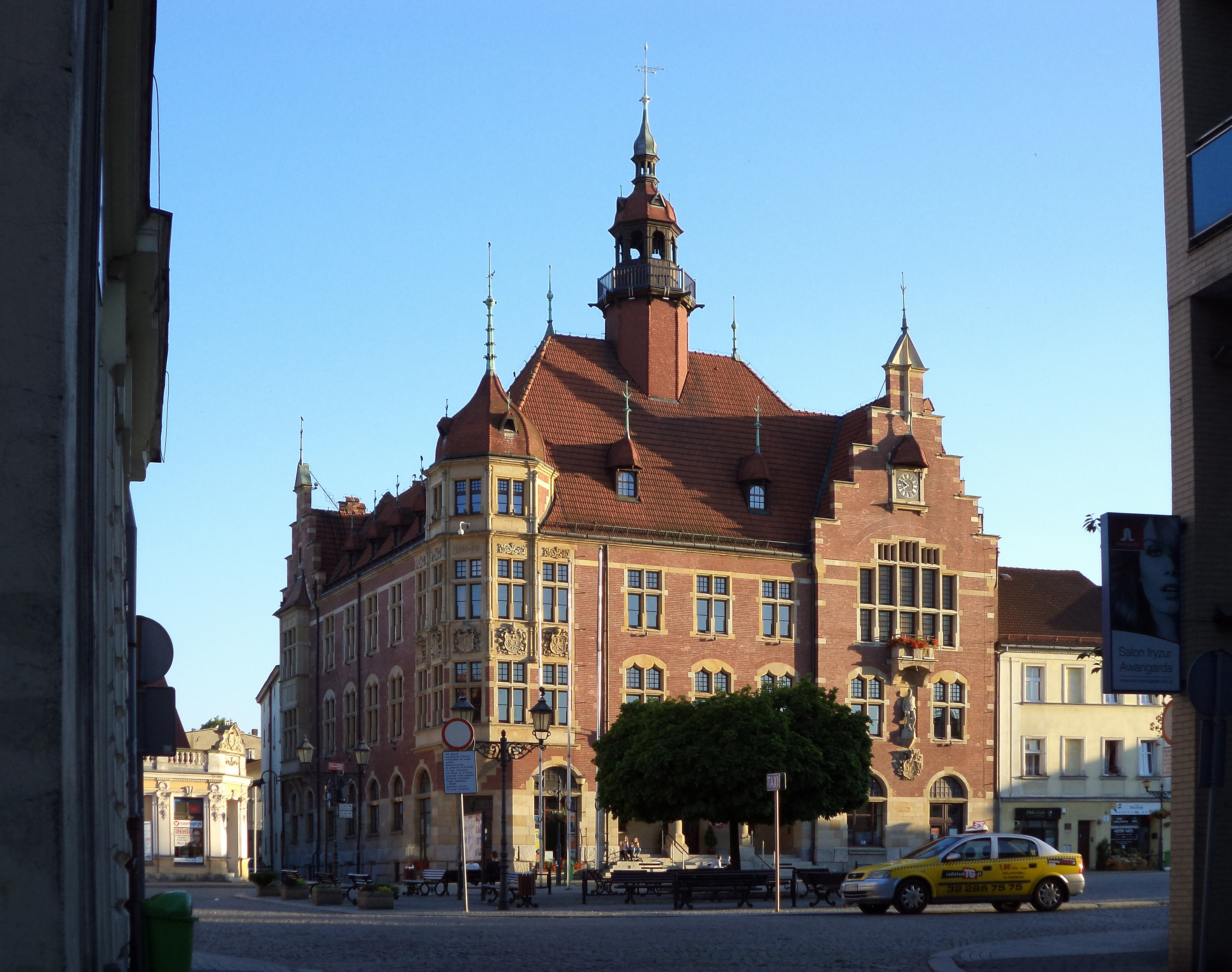 Ratusz w Tarnowskich Górach